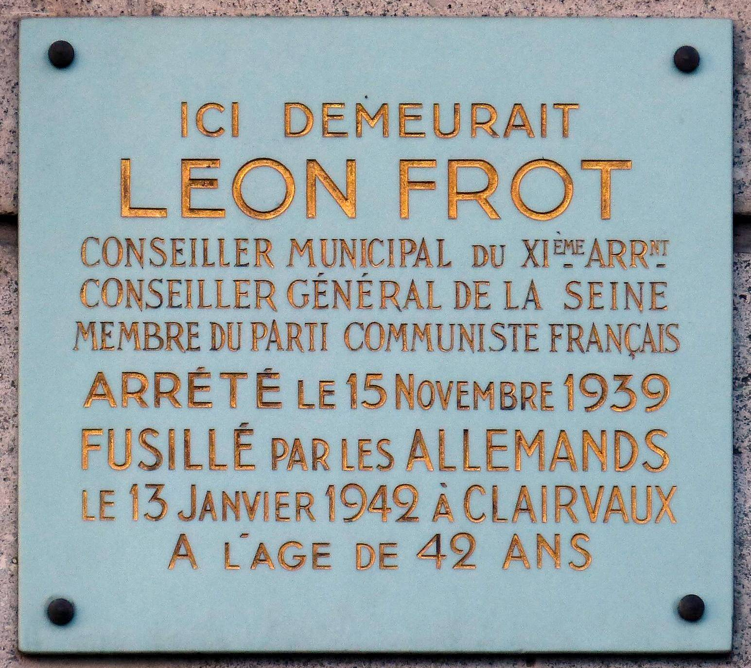 Plaque commémorative apposée sur la façade de l'immeuble du 55 rue Léon-Frot, en hommage à Léon Frot.